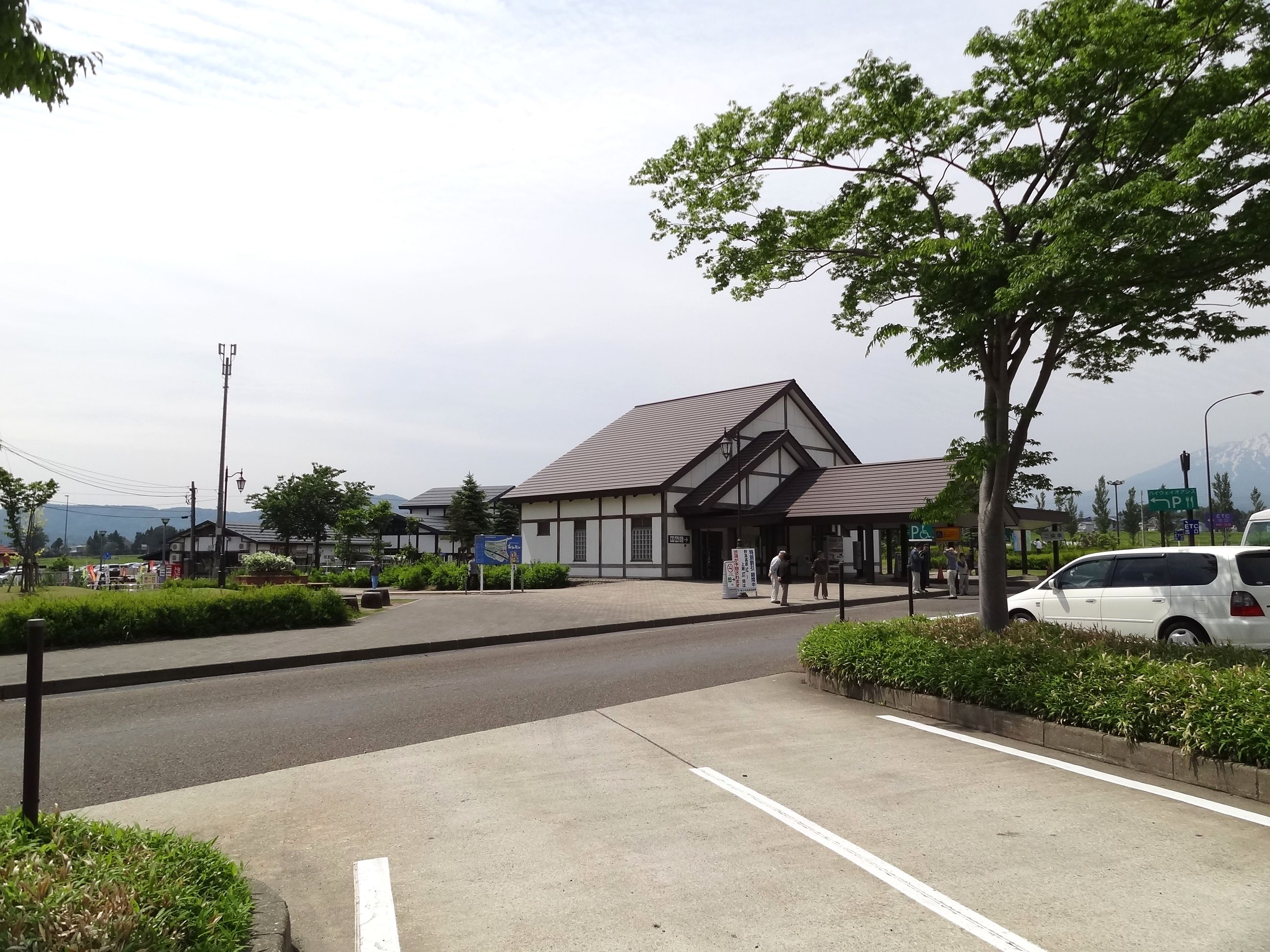 上信越自動車道 新井パーキングエリア（上り線）